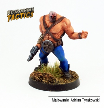 Jedna z figurek występująca w grze Neuroshima Tactics